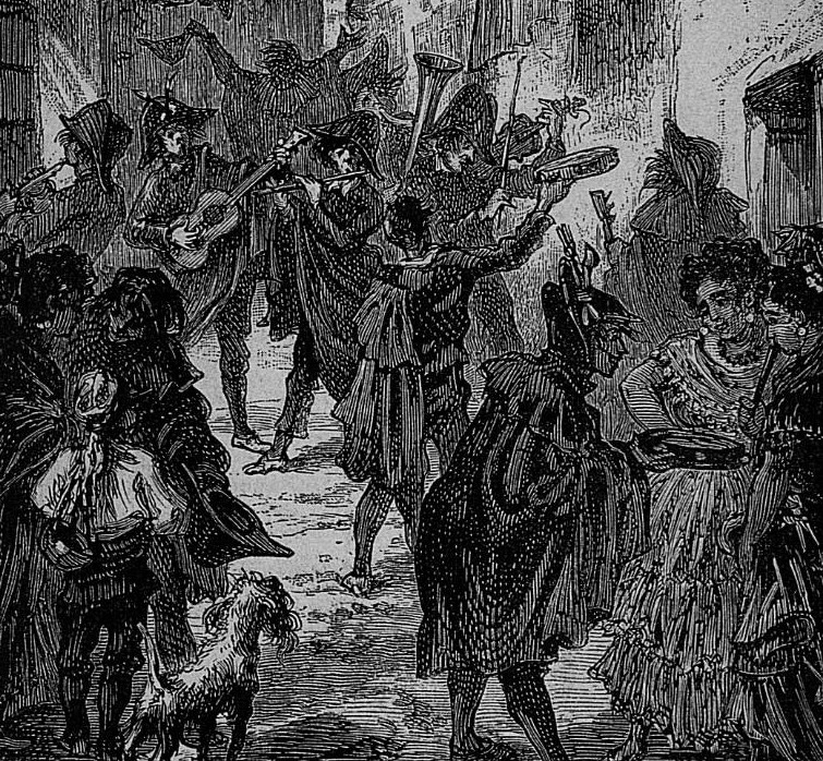 Une Estudiantina donne un concert dans une ville d'Espagne.